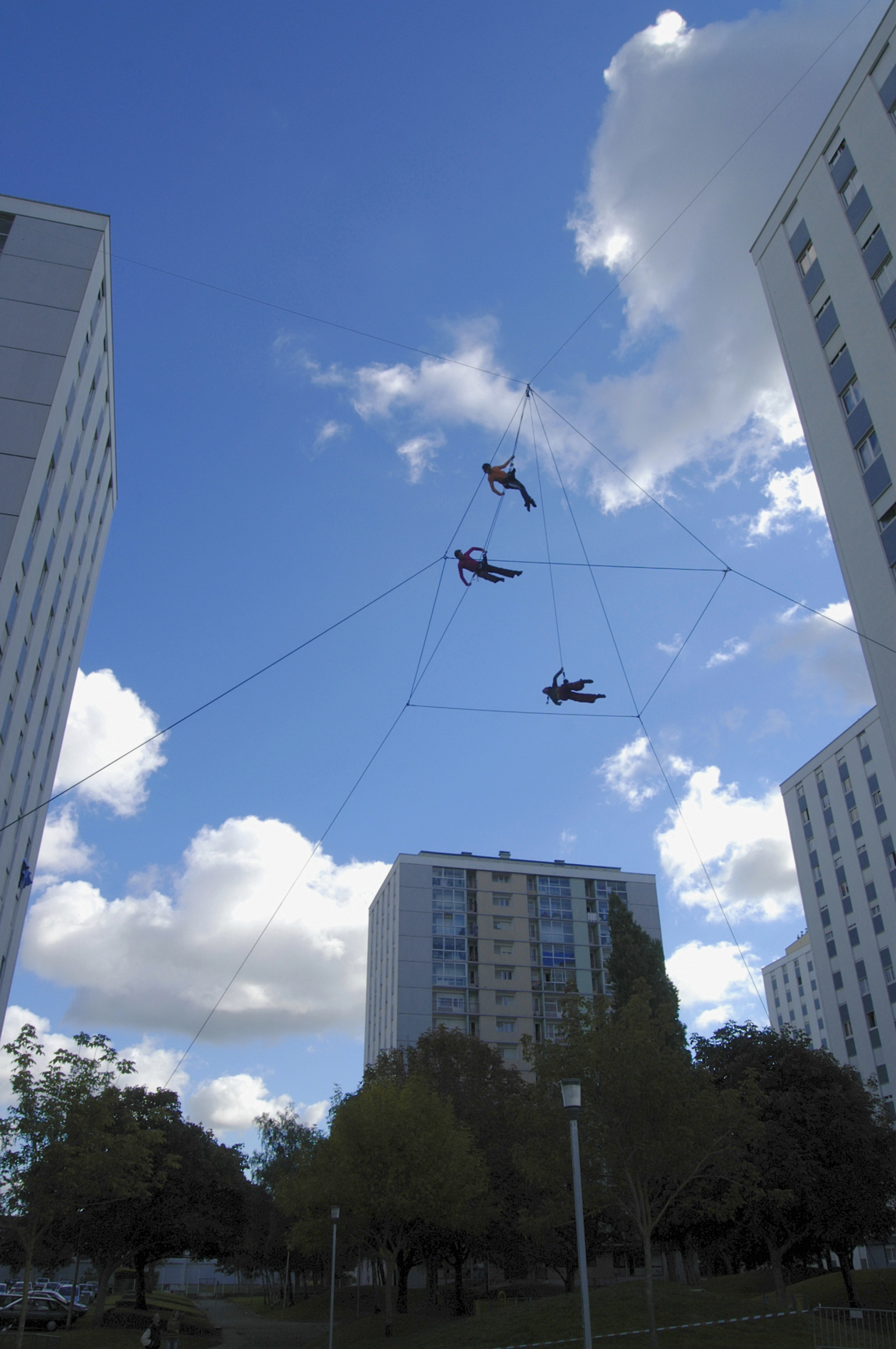 Vide Accordée est une création pour l'espace public